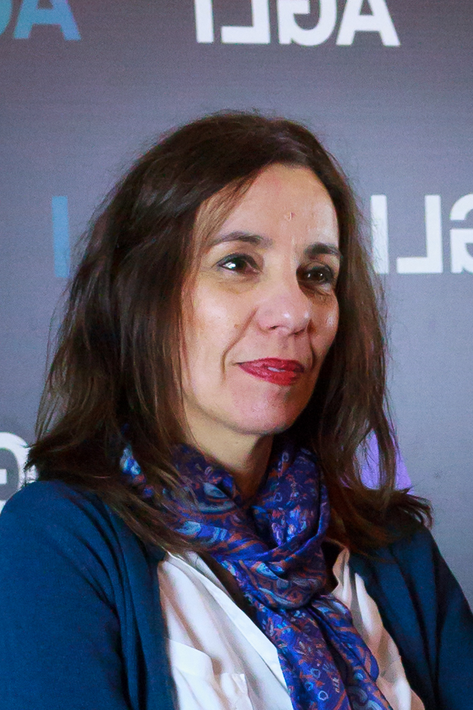 Heloísa Apolónia nos Prémios Arco-Íris, em Janeiro de 2019.